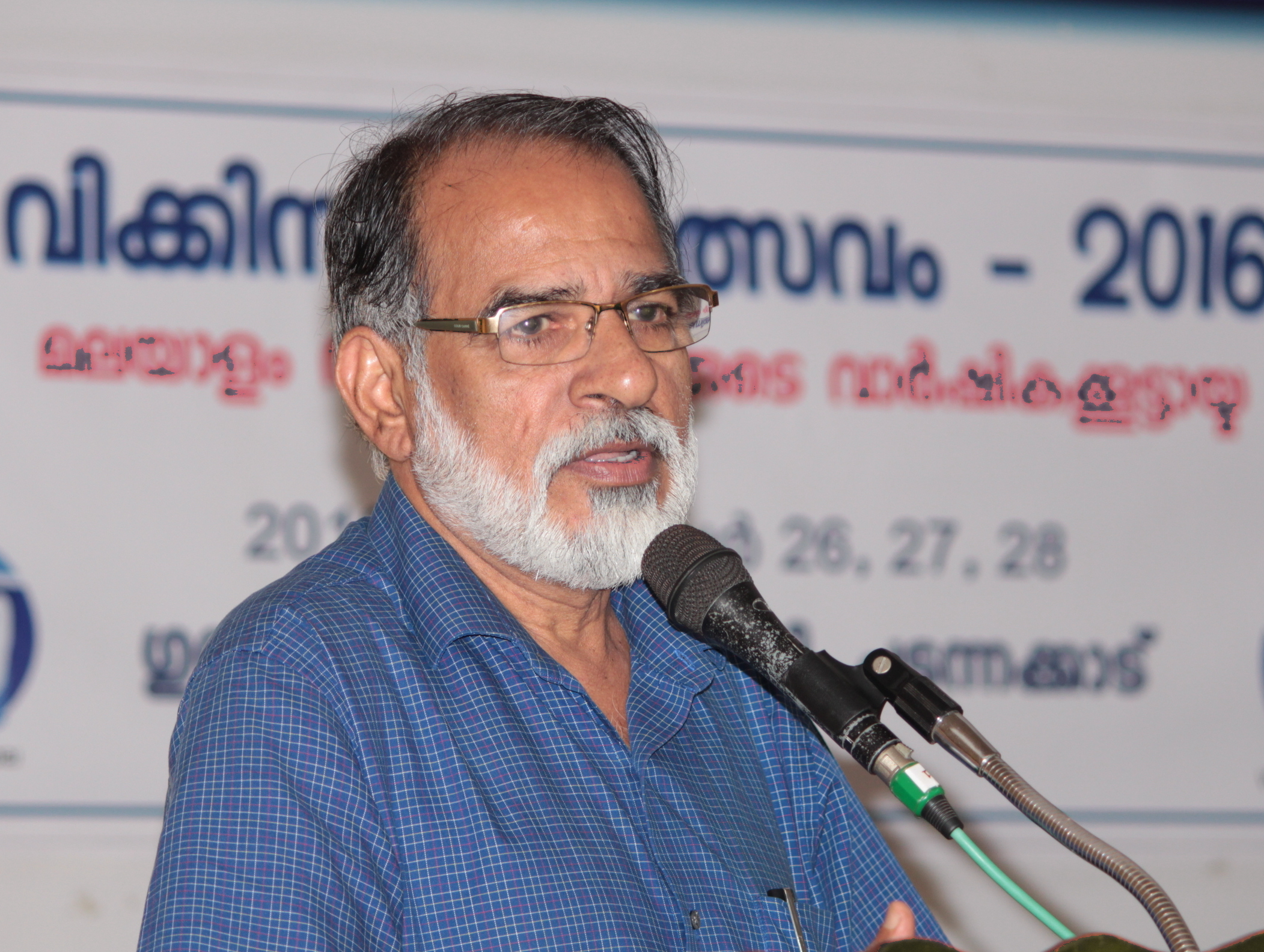 എം.എ റഹ്‌മാന്‍ 2016ലെ മലയാളം വിക്കി സംഗമോത്സവവേദിയില്‍